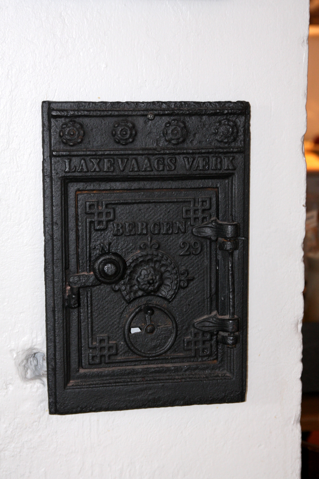 Ovn fra Laxevaags Værk